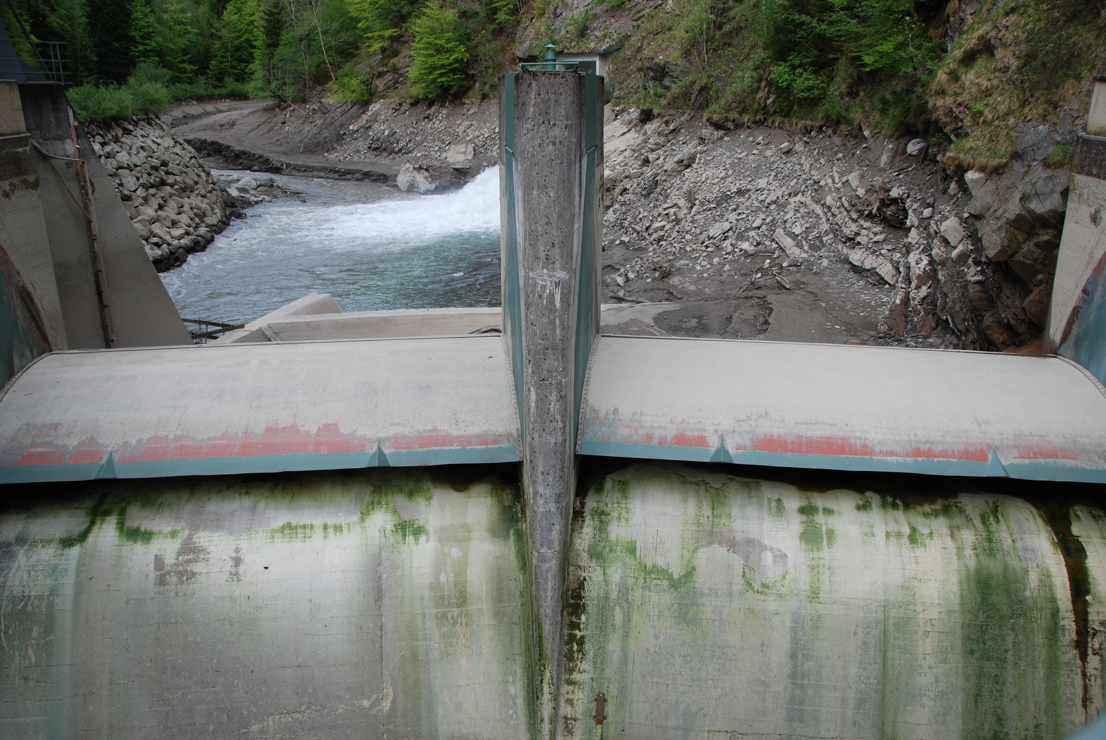 Wehrklappen vollständig umgelegt bei entleertem Stausee